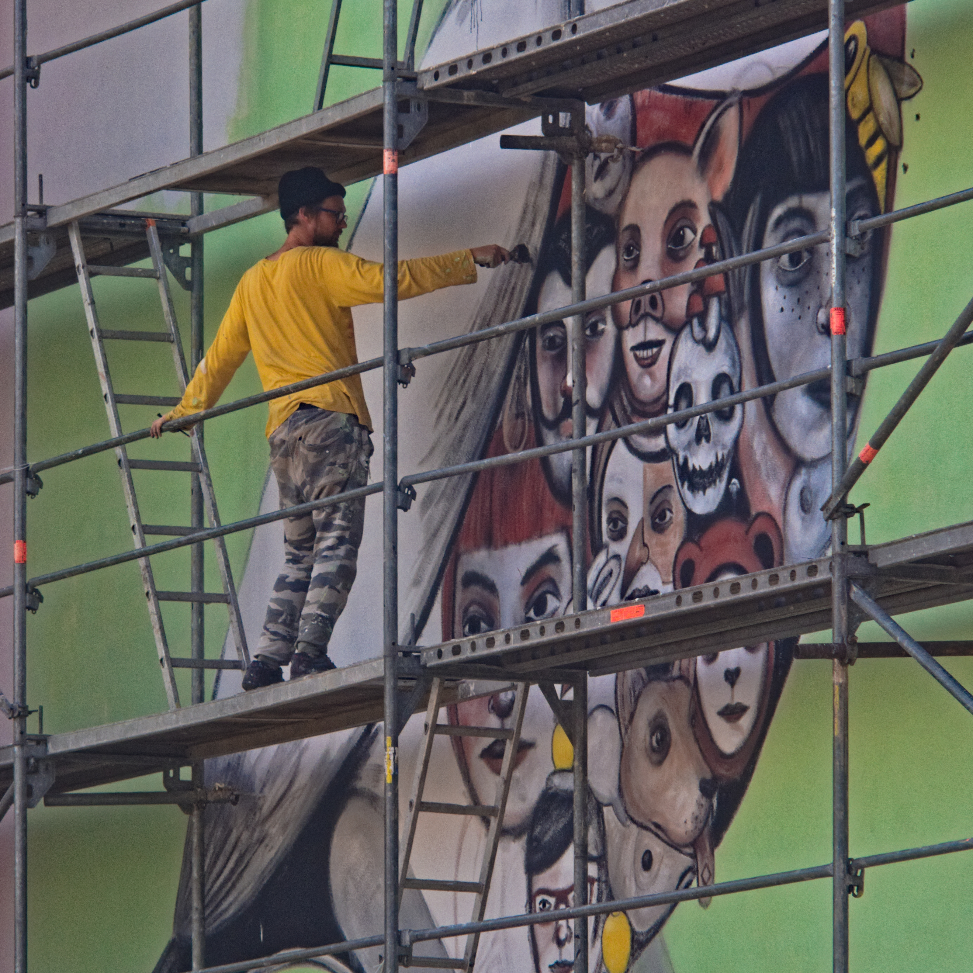 polski artysta Raspazjan (1982– ) maluje mural na ścianie kamienicy przy ul. Chorzowskiej 13 w Bytomiu-Rozbarku; mural który miał zaakcentować powrót Międzygalaktycznego Zlotu Superbohaterów do Bytomia, widoczny fragment przedstawia brzuch ptaka